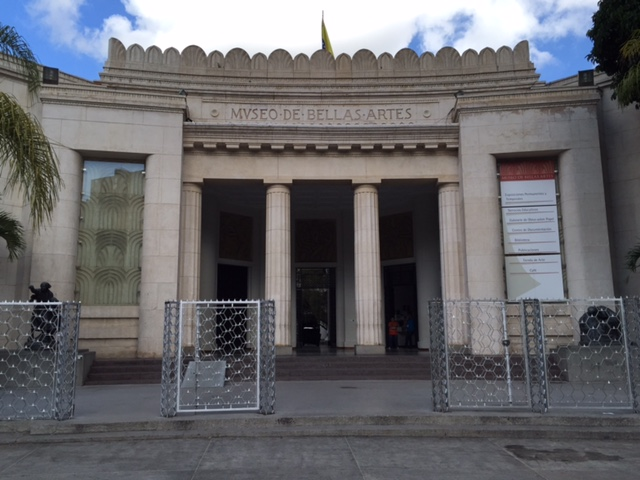 Fachada principal del Museo de Bellas Artes de Caracas en la Plaza de los Museos.